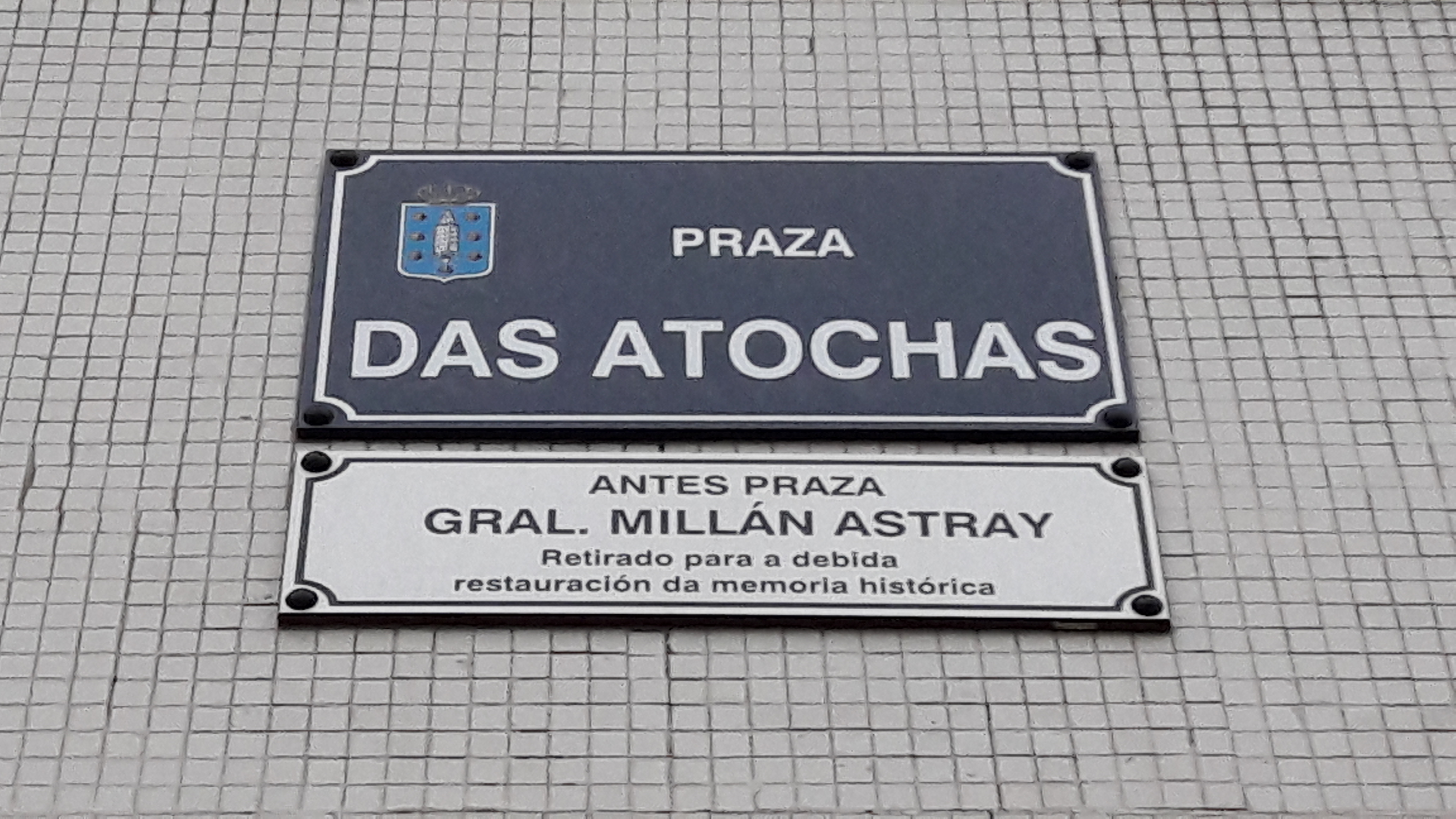 Rótulo da praza das Atochas (A Coruña) con referencia á lei sobre a memoria histórica